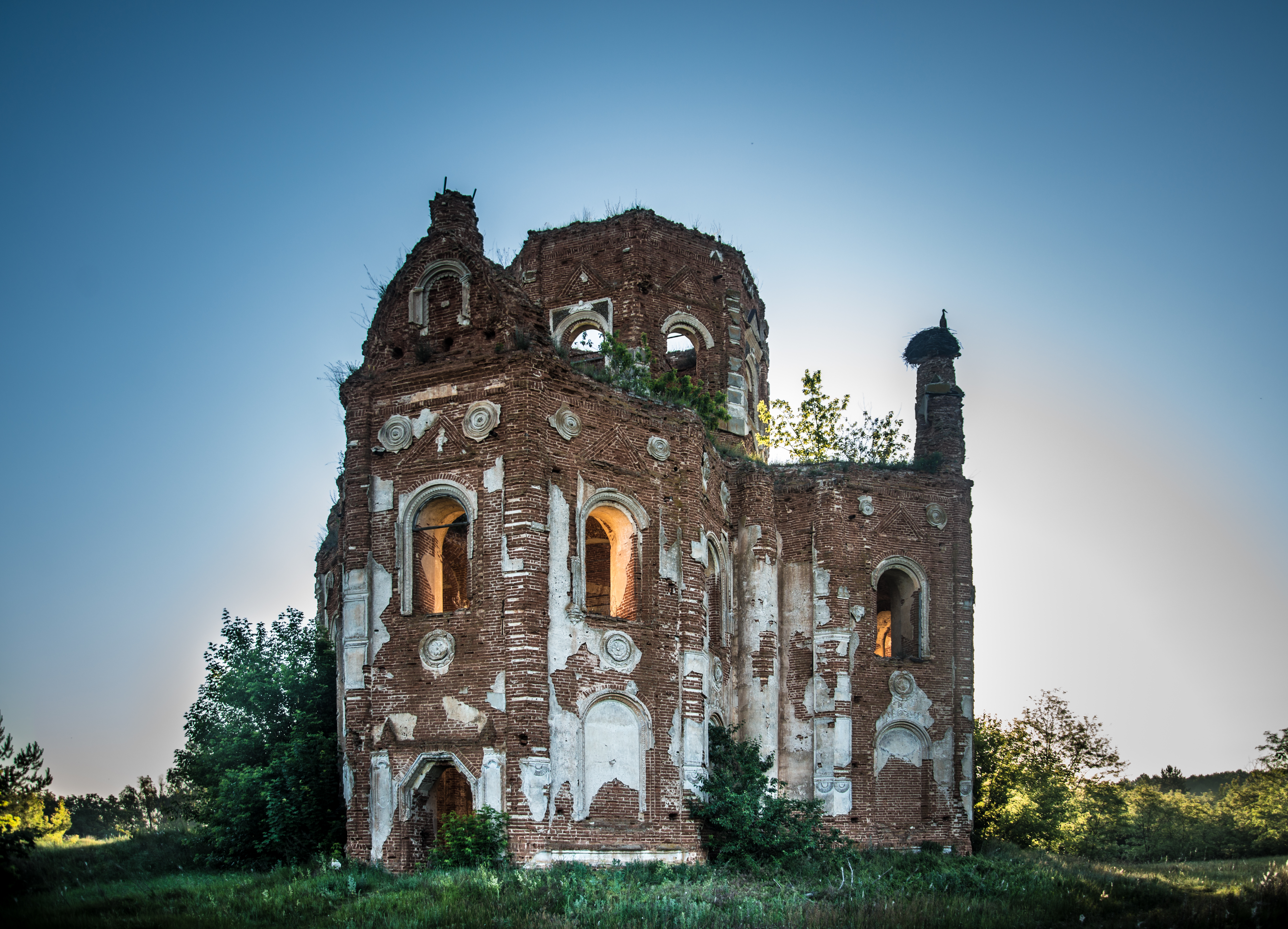 Церковь Успенская: Забрама, Климовский район, Брянская область